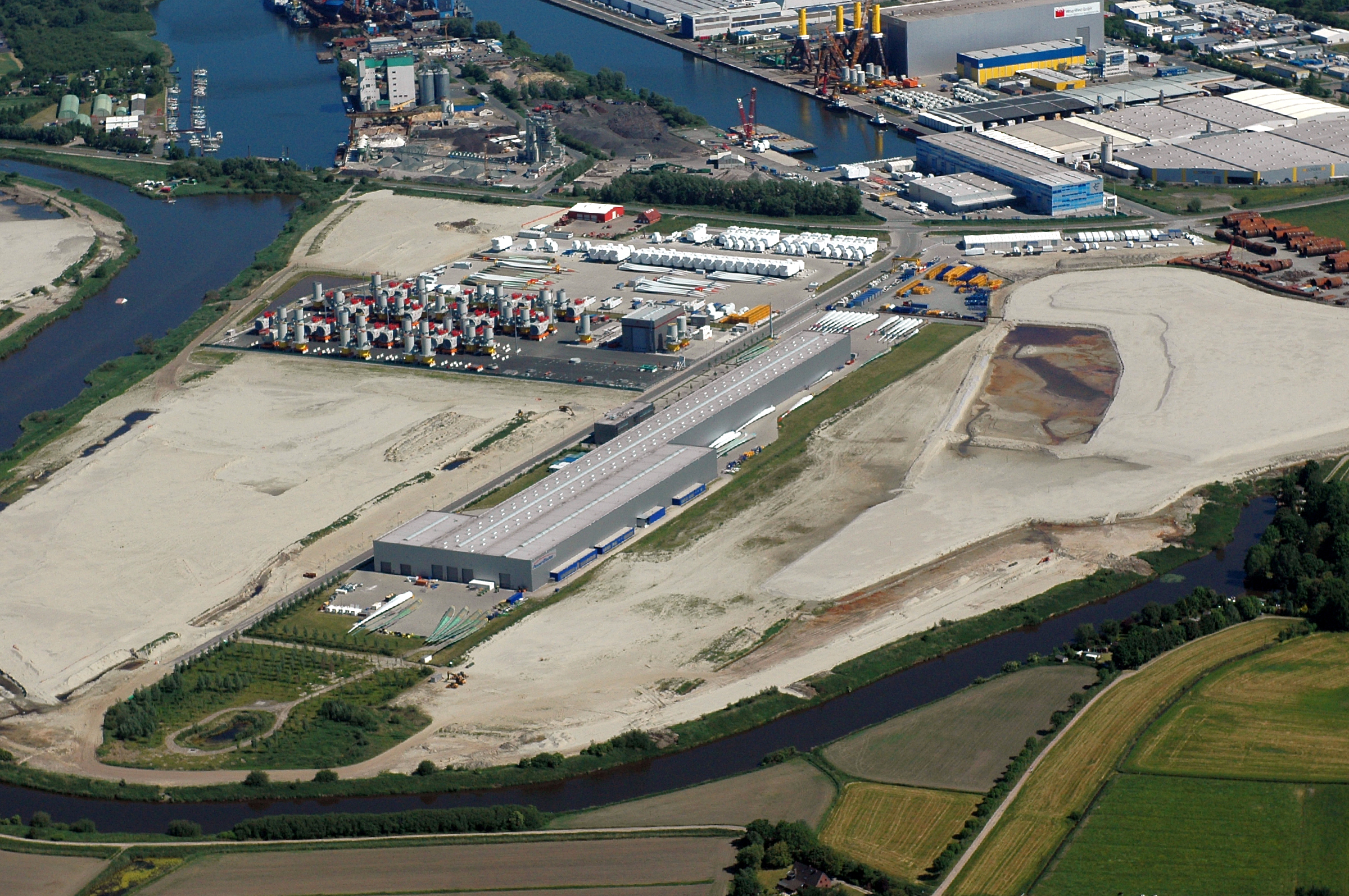 Fotoflug vom Flugplatz Nordholz-Spieka über Cuxhaven und Wilhelmshaven